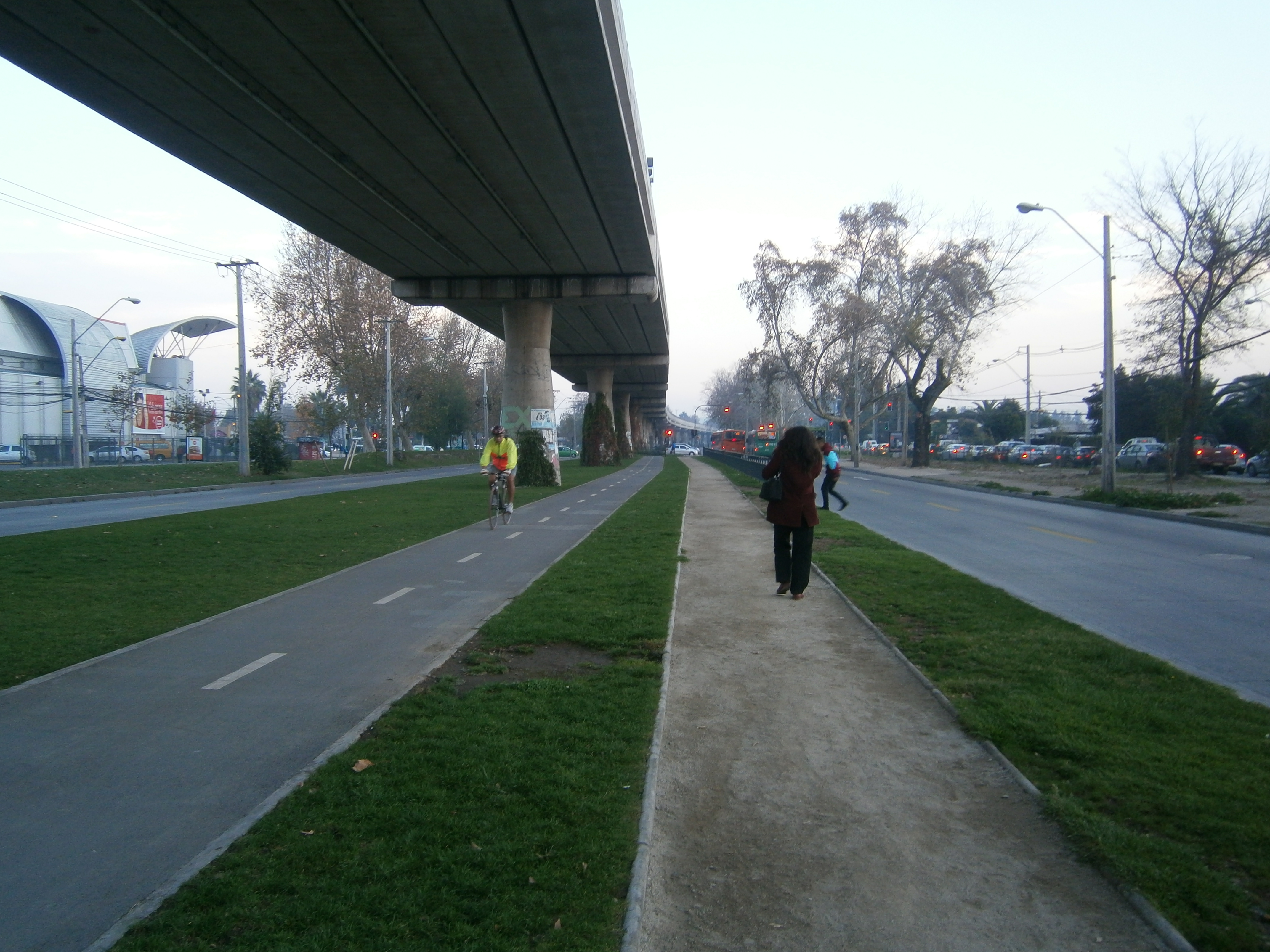 Ciclovía bajo la linea del metro que va por Avenida Pajaritos en Maipú, Santiago de Chile